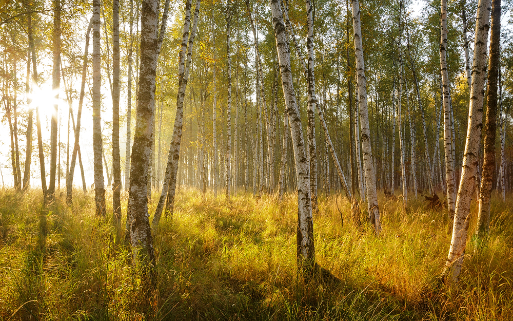 Лосиный остров, национальный парк, Городской округ Балашиха This image is related to the protected area of Russia number 5030008